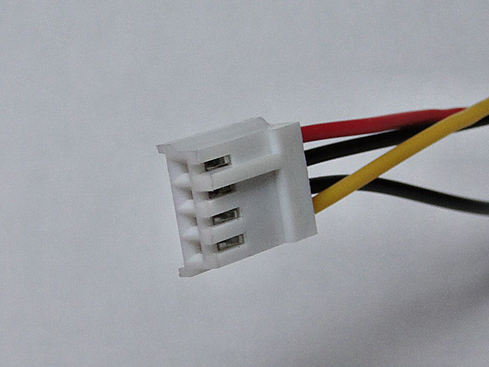 wtyk molex mini